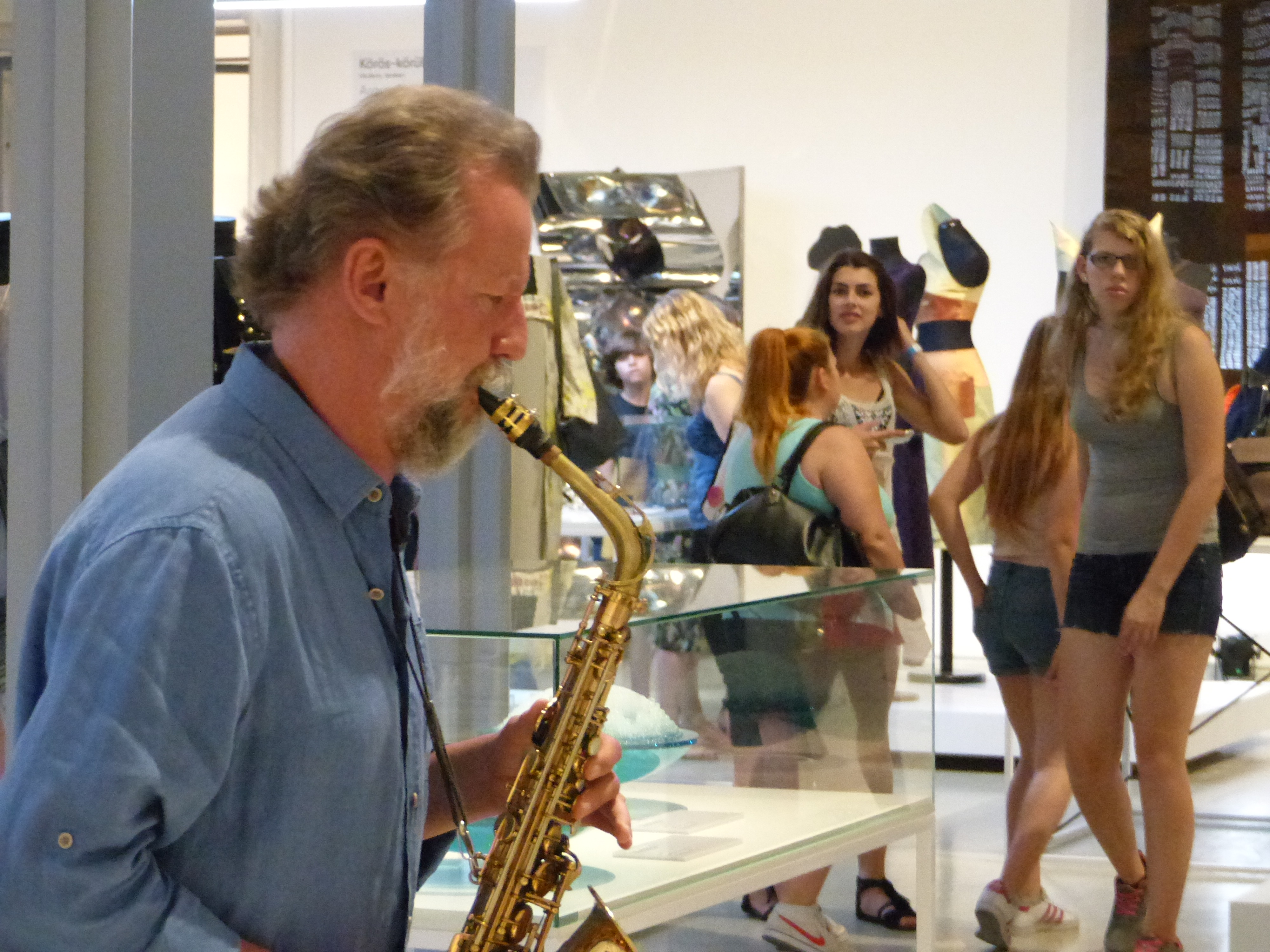 Borbély Mihály saxofonos, Kossuth- és Liszt Ferenc-díjas zenész. a népzene, a világzene, a jazz és a kortárs zene területén egyaránt ismert. A Műcsarnokban, a Múzeumok éjszakáján. Improvizációval követte a kiállítást, zenéjével reflektált a művekre, megszólaltatja azok ritmusát, hangulatát. A felvétel 2017. június 24-én készült a Műcsarnokban, Budapesten.